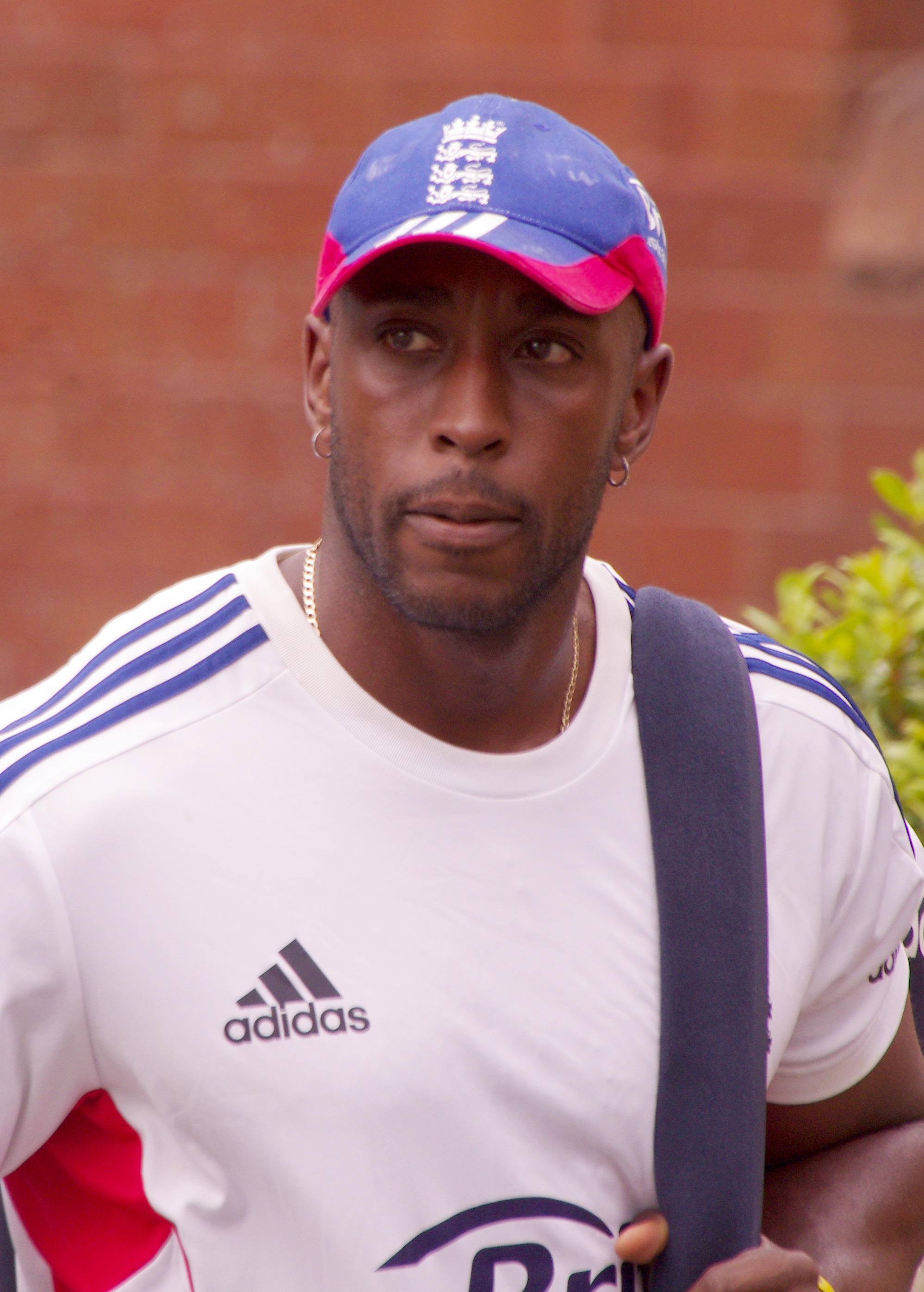 MICHAEL CARBERRY